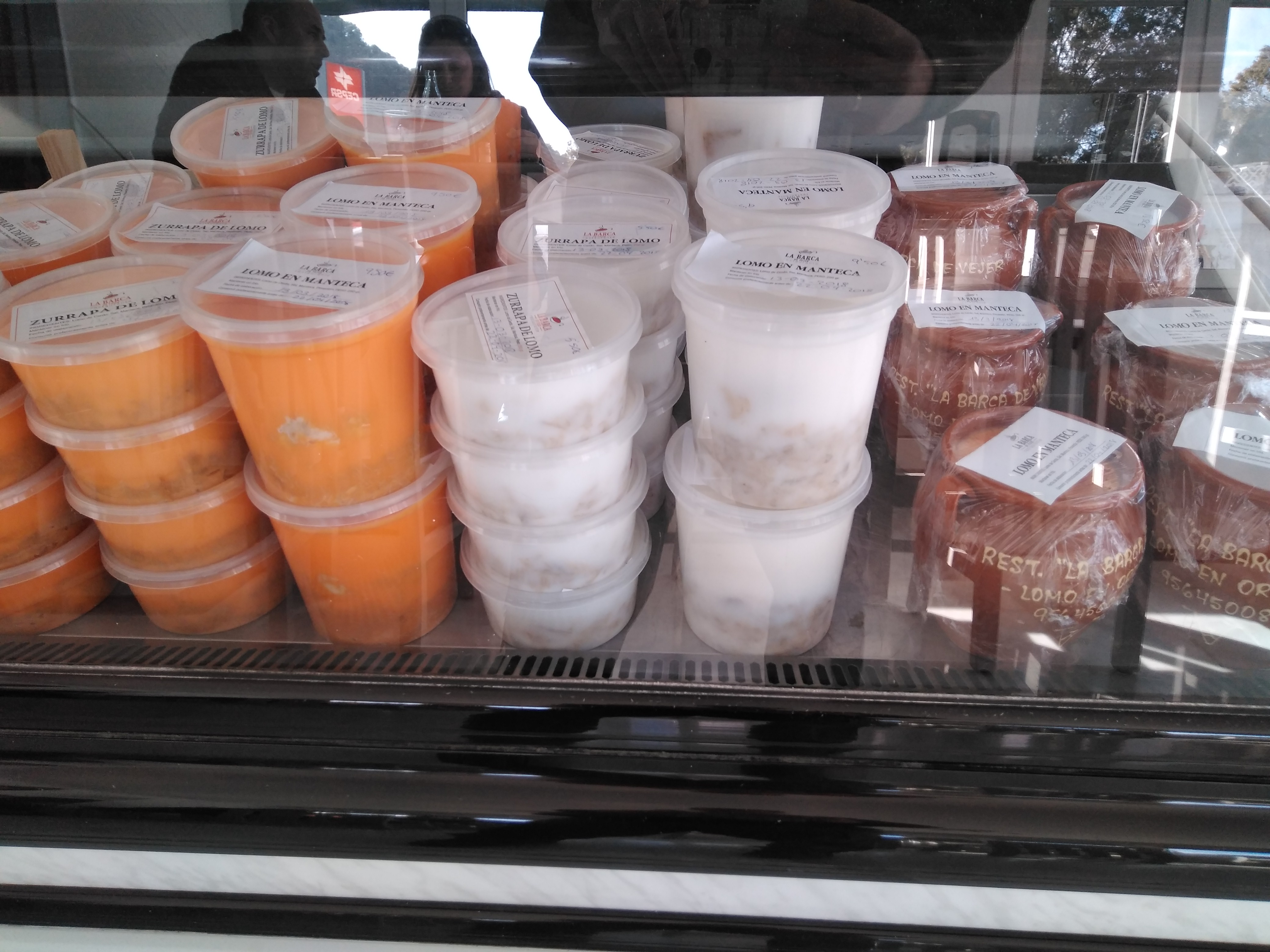 Diversos tipos de lomo en manteca en la venta de La Barca de Vejer